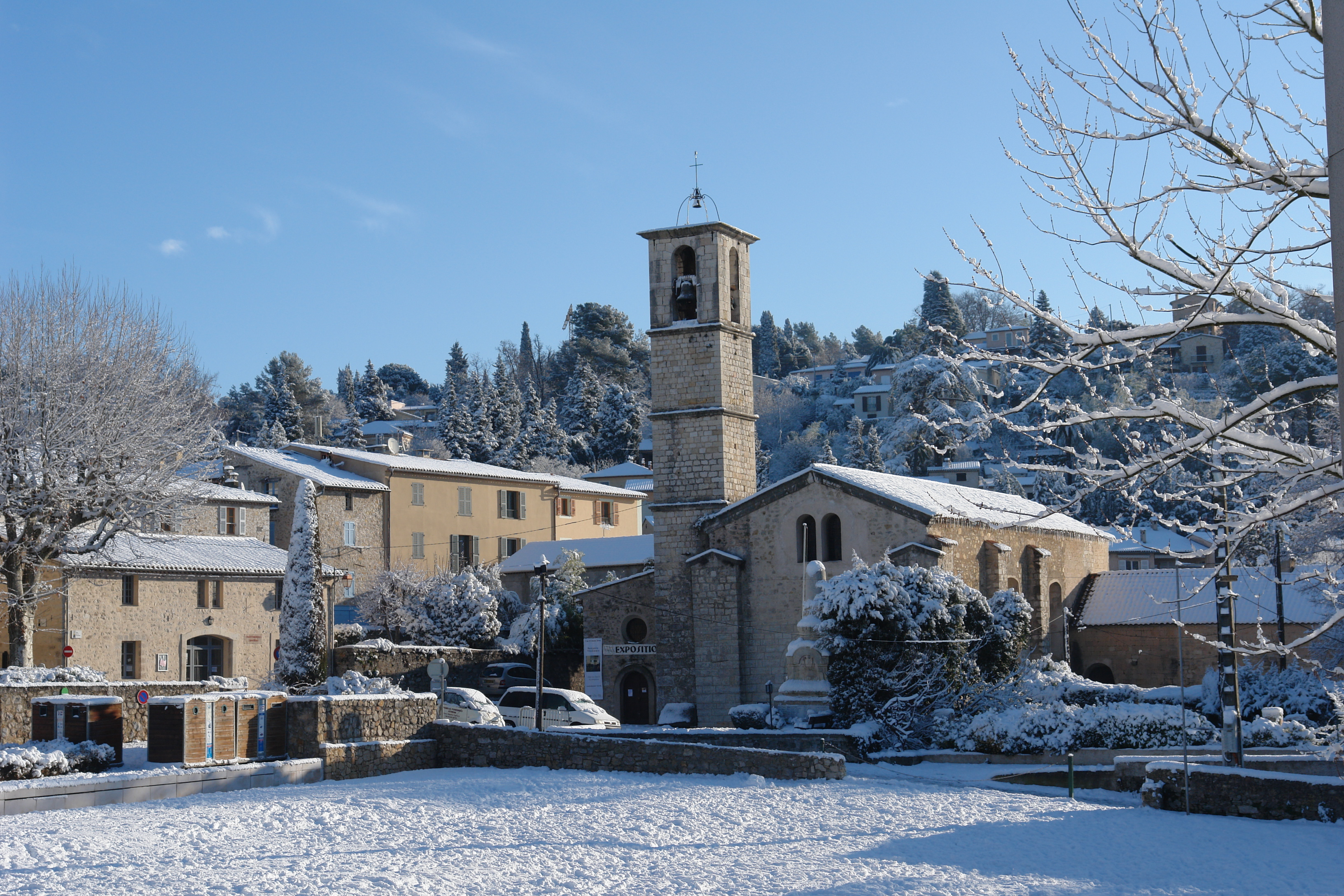 Valbonne (06) Alpes Maritimes